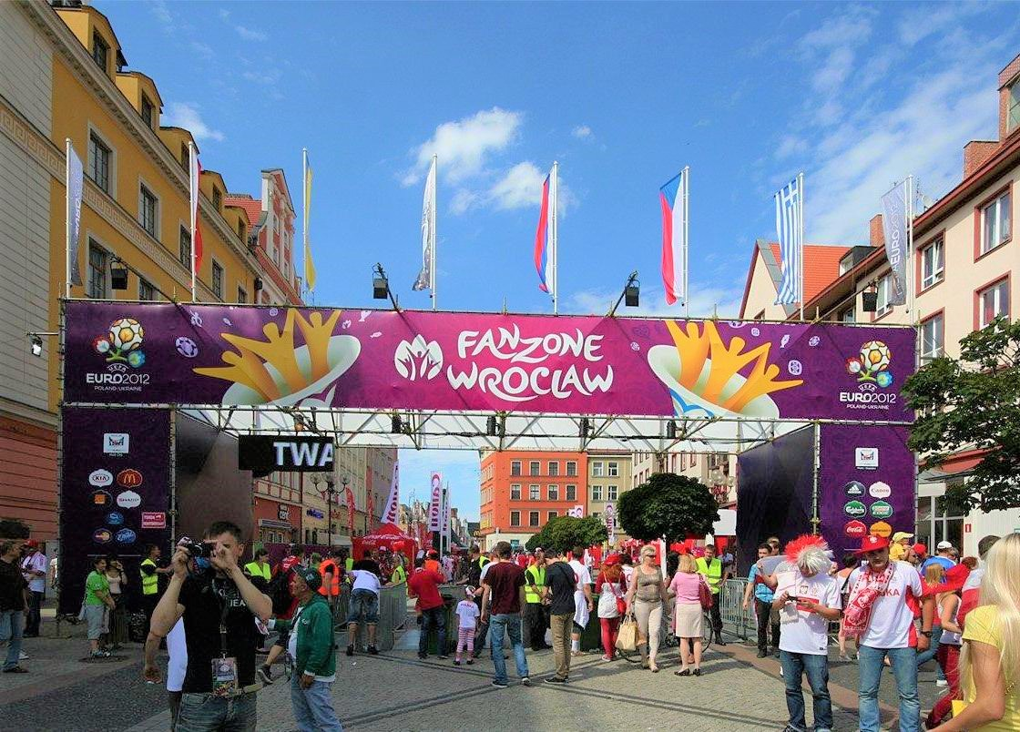 Wejście do strefy na ulicy Świdnickiej